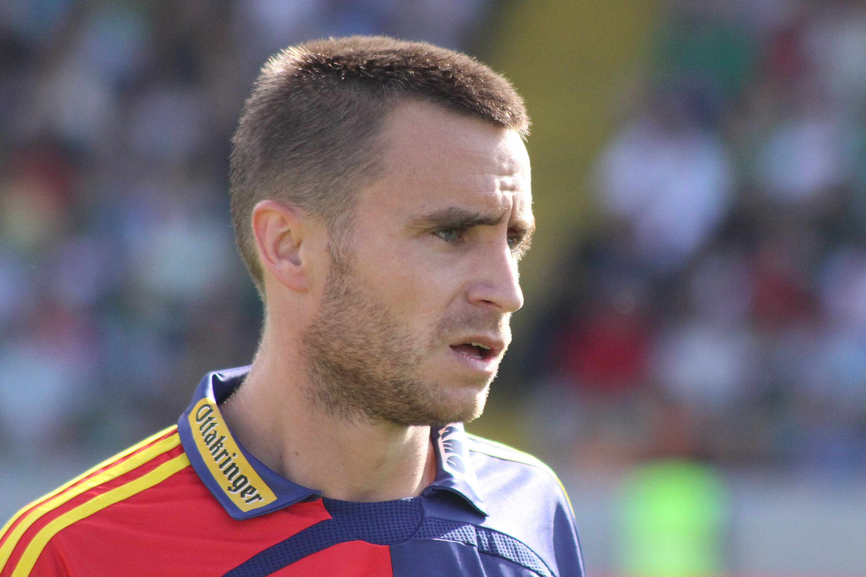 Steffen Hofmann - SK Rapid Wien (2)